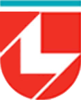 Escudo del Partido de Lanus